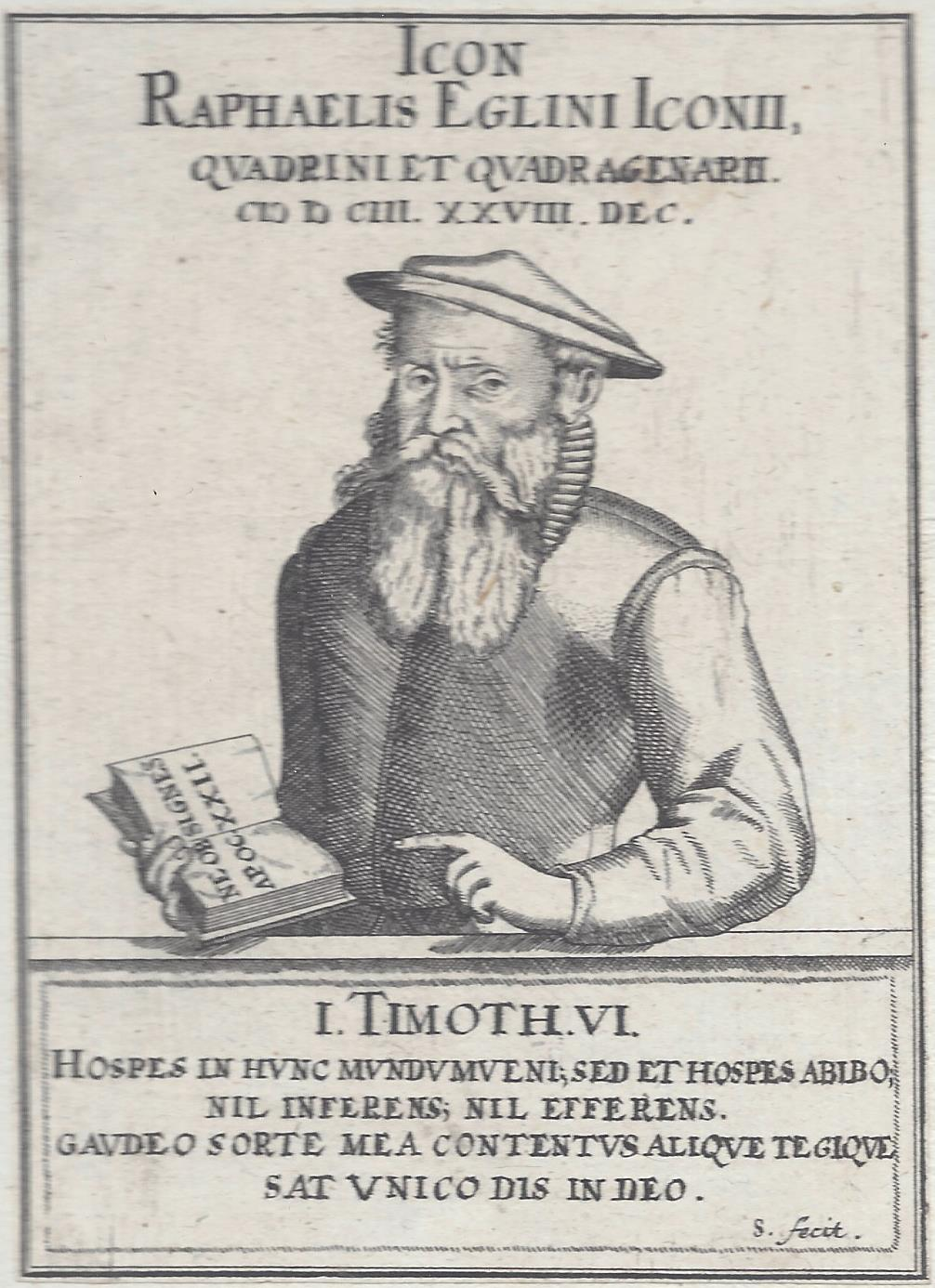 Monogrammist S.: Porträt des Raphael Eglin, datiert 28. Dezember 1603.